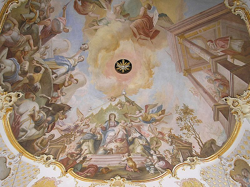 Pfarrkirche Mariä Himmelfahrt (Türkenfeld, Landkreis Fürstenfeldbruck, Oberbayern). Hauptfresko des Langhauses (Johann Baptist Baader, 1766). Eigene Aufnahme, Febr. 2007 / Parish church "Assumption of Mary" (Tuerkenfeld near Fuerstenfeldbruck, Upper Bavaria, Germany). The nave. Great fresco (Johann Baptist Baader, 1766). Own photo, Febr. 2007